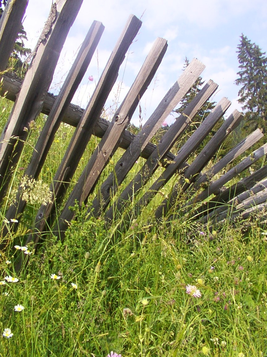 Село Манастир